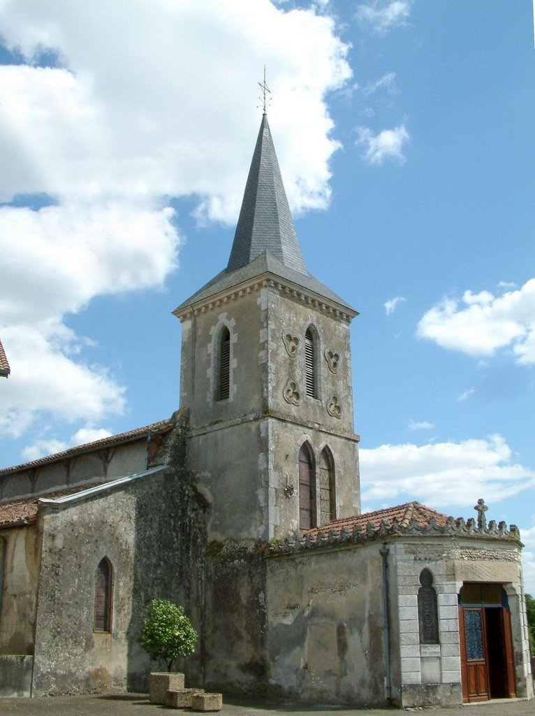 Église Sainte-Eulalie de Saint-Sever (Landes, France)